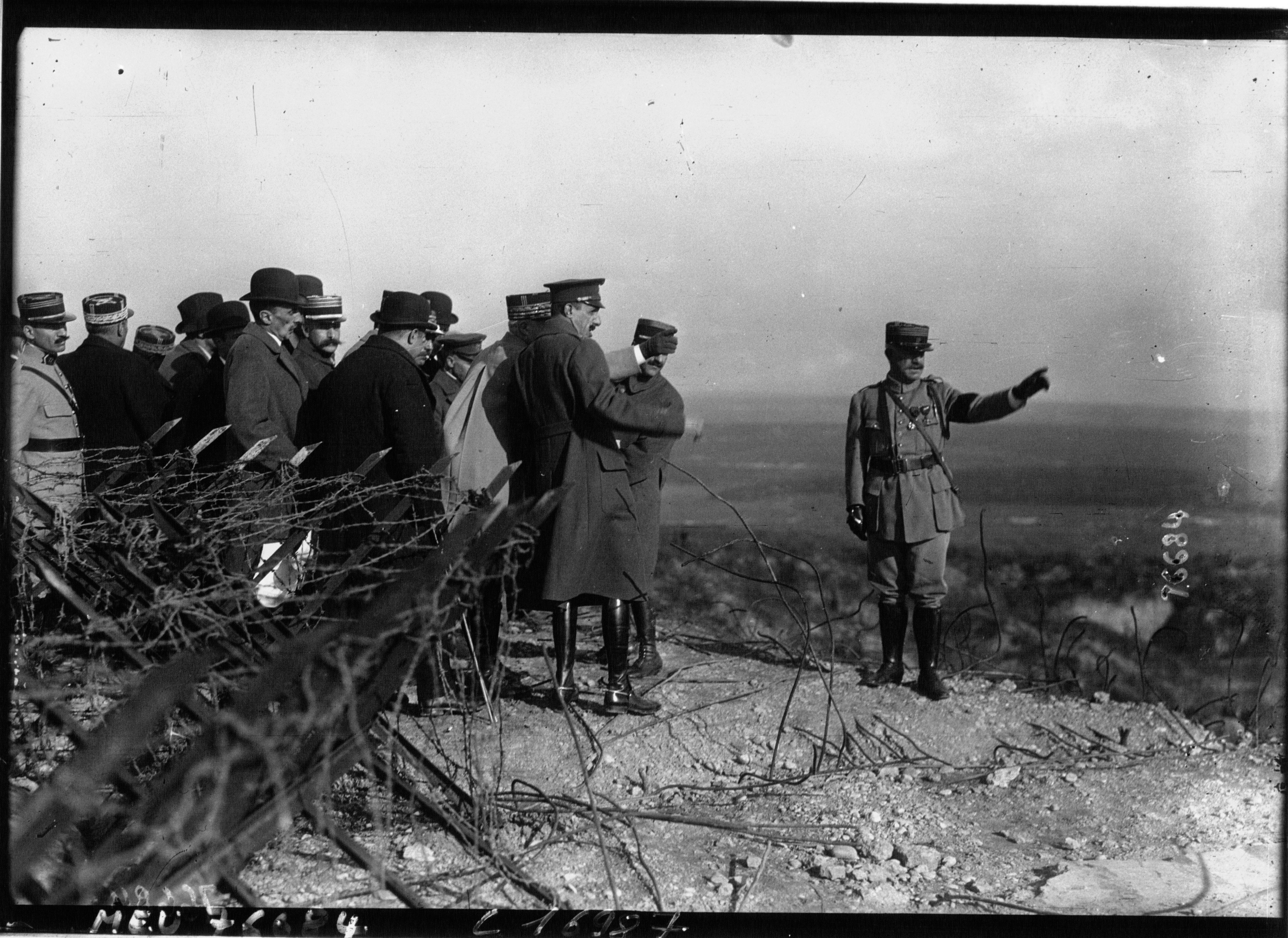 Visite du roi Alphonse XIII à Verdun en 1919, ici sur les dessus du fort de Vaux.